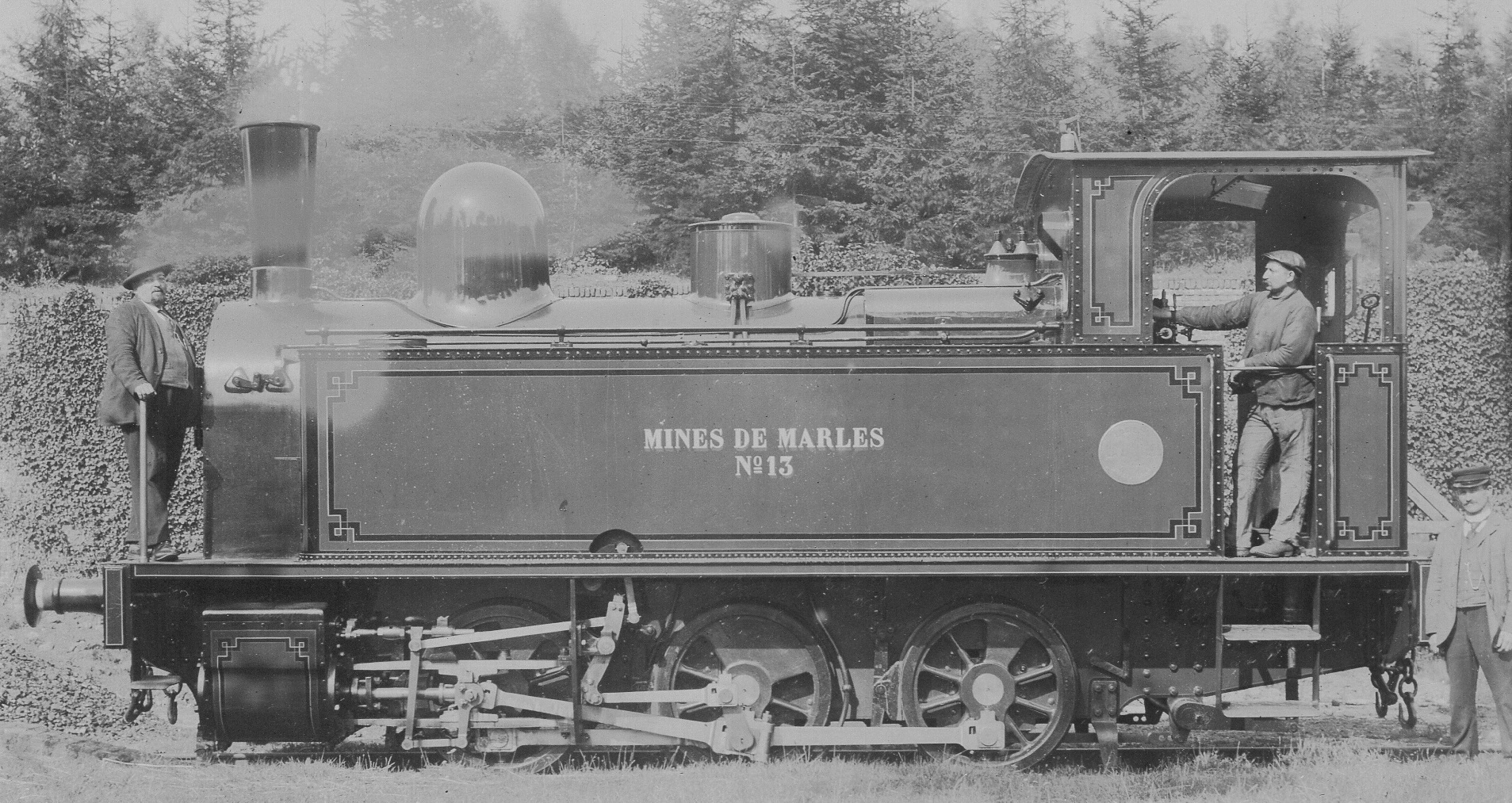 Gros plan de la Locomotive N° 13 de la Cie des Mines de Marles (Pas-de-Calais) en 1905. Cliché animé, trois personnages, chauffeur et mécanicien et un cadre grimpé à l'avant de la locomotive à vapeur. Le document est tiré du fonds de l'album Le Cornec, ingénieur chef mécanicien. Cet ingénieur en hydrauliques et spécialiste d'installation de pompes a voyagé comme officie sur le Yacht-steamer "Sans Peur", bateau de M. Etienne Fould qui l'a acquis en 1887. Puis, à partir de 1900 on le retrouve à Auchel (Pas-de Calais) où il travaille pour la Compagnie des Mines de Marles.